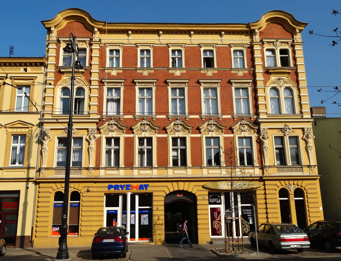 Kamienica przy ul. Gdańskiej 101 w Bydgoszczy (1892-1893, aut. Józef Święcicki)